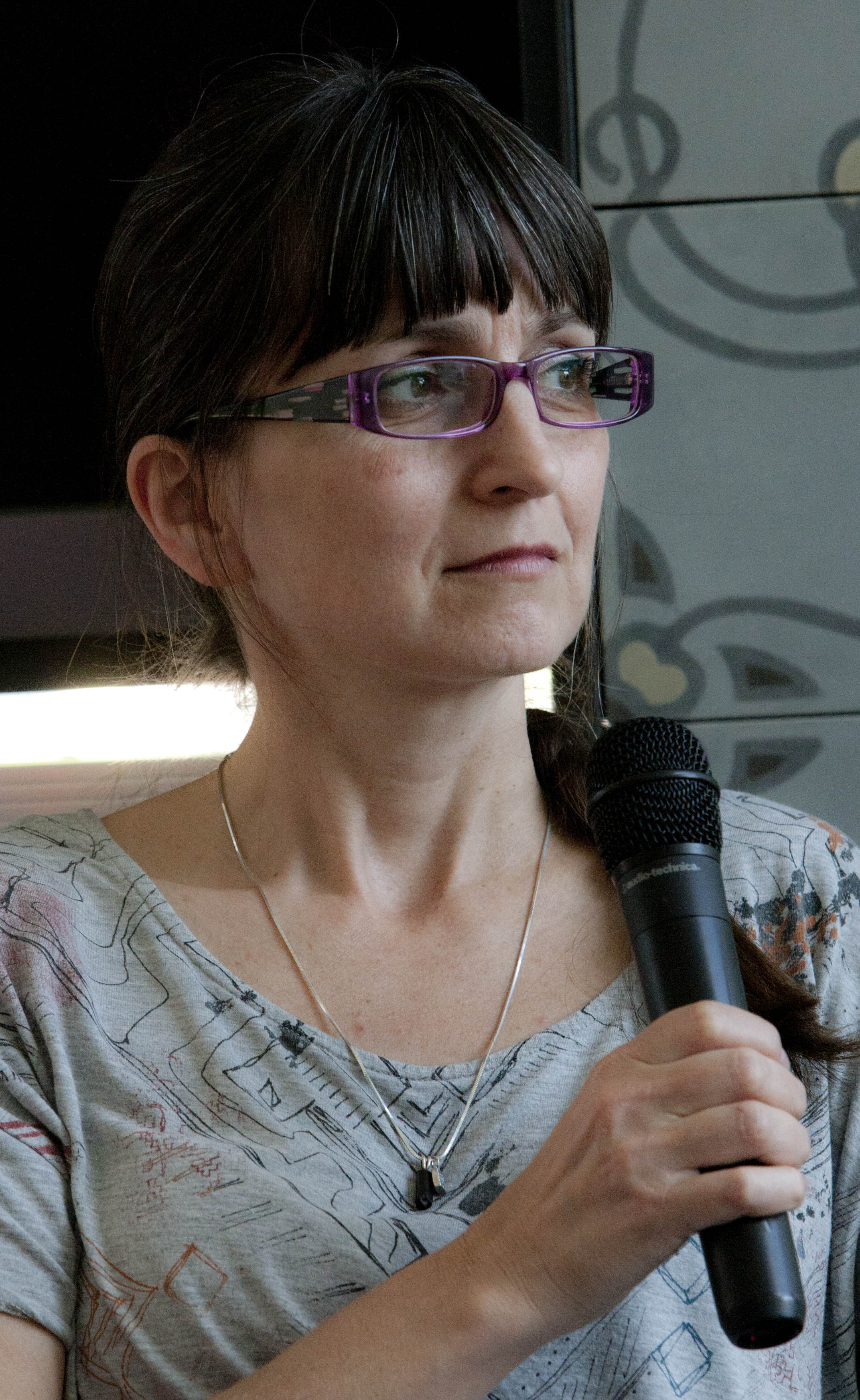 Európai Írótalálkozó 2015.04.24. Karin Peschka (Ausztria) Fotó: Európai Bizottság/ Dudás Szabolcs